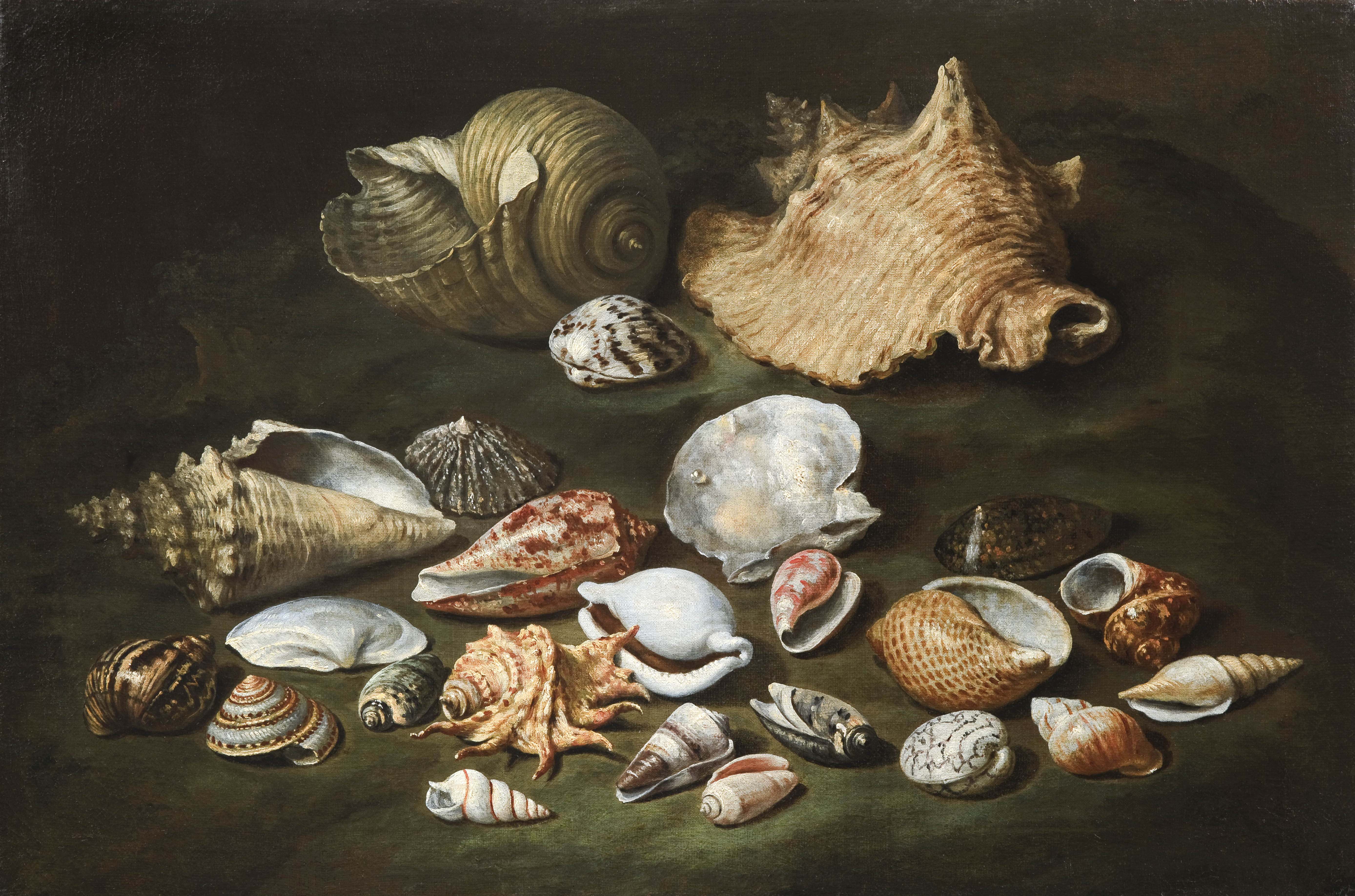 Paolo Porpora (1617-ca.1673) - Still life with shells, oil on canvas, 44,5 x 67 cm.jpg